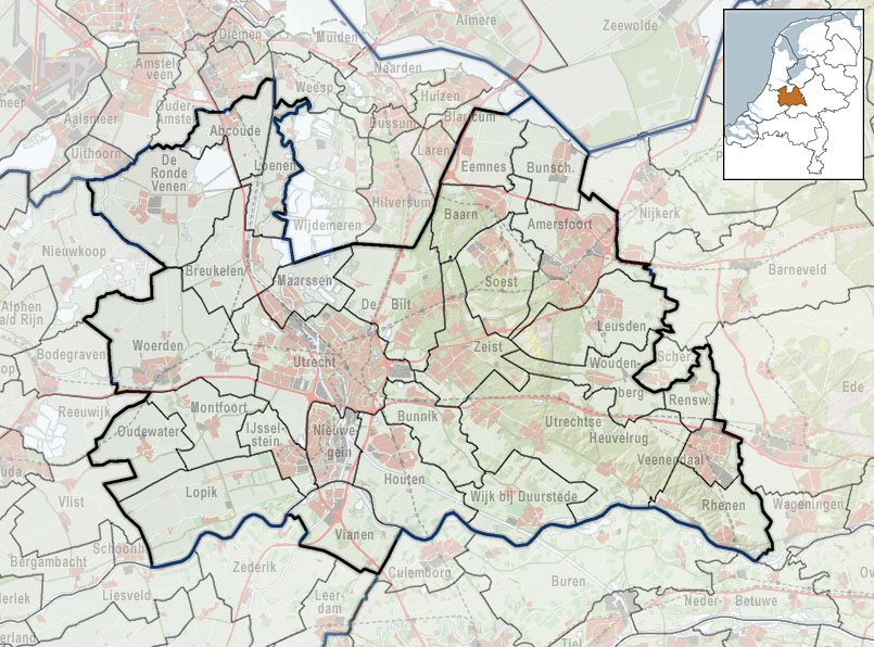 Napulitano: Referentiekaart van Provincie Utrecht, met indeling van gemeenten (2010) en impressie van het landschap. Door Jan-Willem van Aalst, samengesteld uit publiek beschikbare geo-data: Referentie-ondergrond (kustlijn, steden, wegen) gerasterd uit de OpenStreet Map OSM. ( Inhoud is beschikbaar onder de Creative Commons Attribution-ShareAlike 3.0 license. Referentie-ondergrond op water bewerkt vanuit Gebruik is vrij met bronvermelding NLR en ESA. Vectorgrenzen van gemeenten en regio's vrij ter beschikking gesteld met dank aan cartografen van brandweerregio's Hollands-Midden en IJsselland; gerasterd in Photoshop. Hoogte-aanduidingen (reliëf) gerasterd uit de AHN Viewer ( gebruik is vrij met bronvermelding (c) AHN, Overige kenmerken op de kaart: eigen tekenwerk van Jan-Willem van Aalst, op basis van gerasterde gemeentegrenzen.